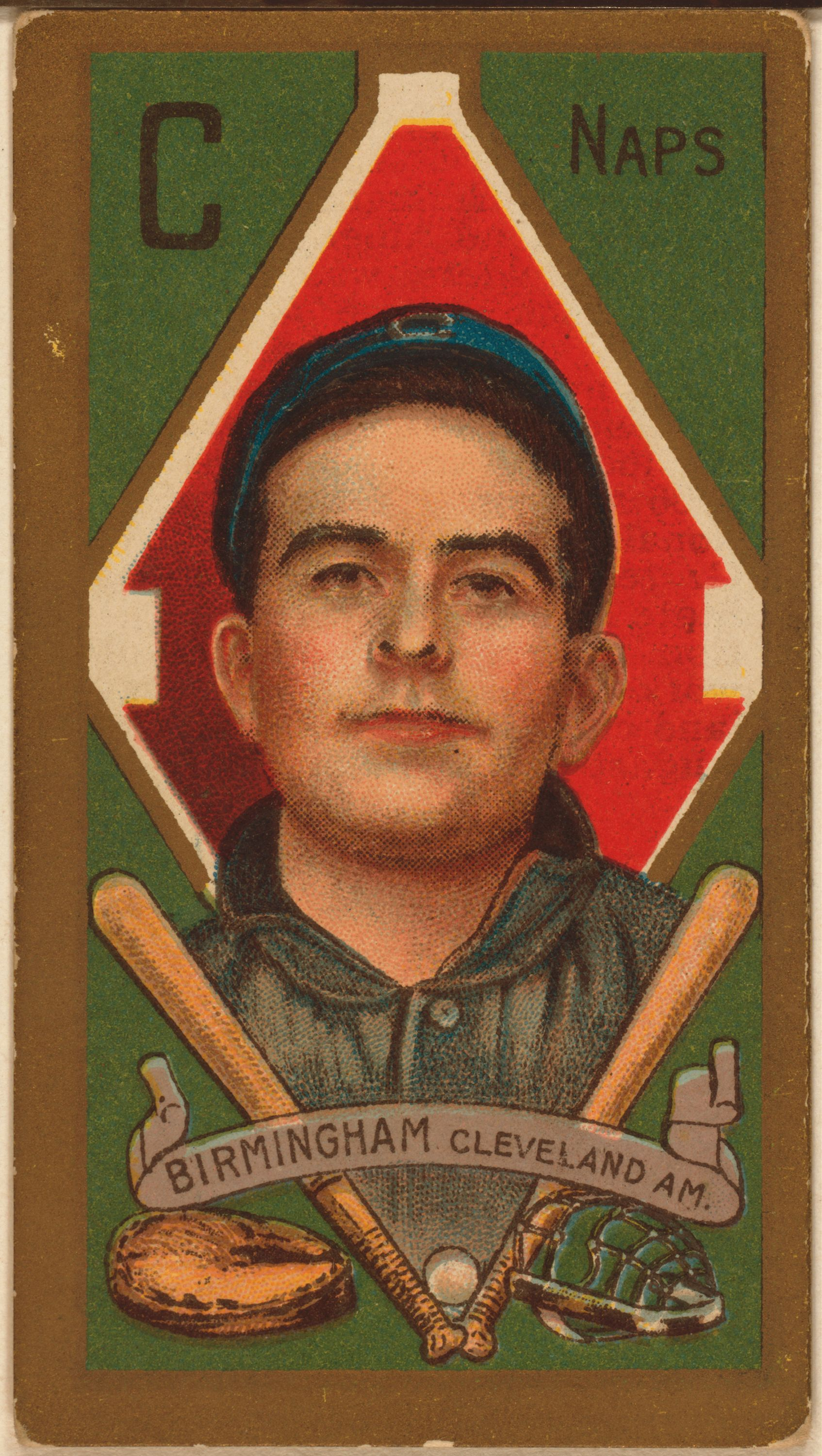 Joseph Birmingham